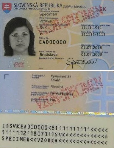 Europsky vzor slovenskeho obcianskeho preukazu vydavany od 01/07/2008